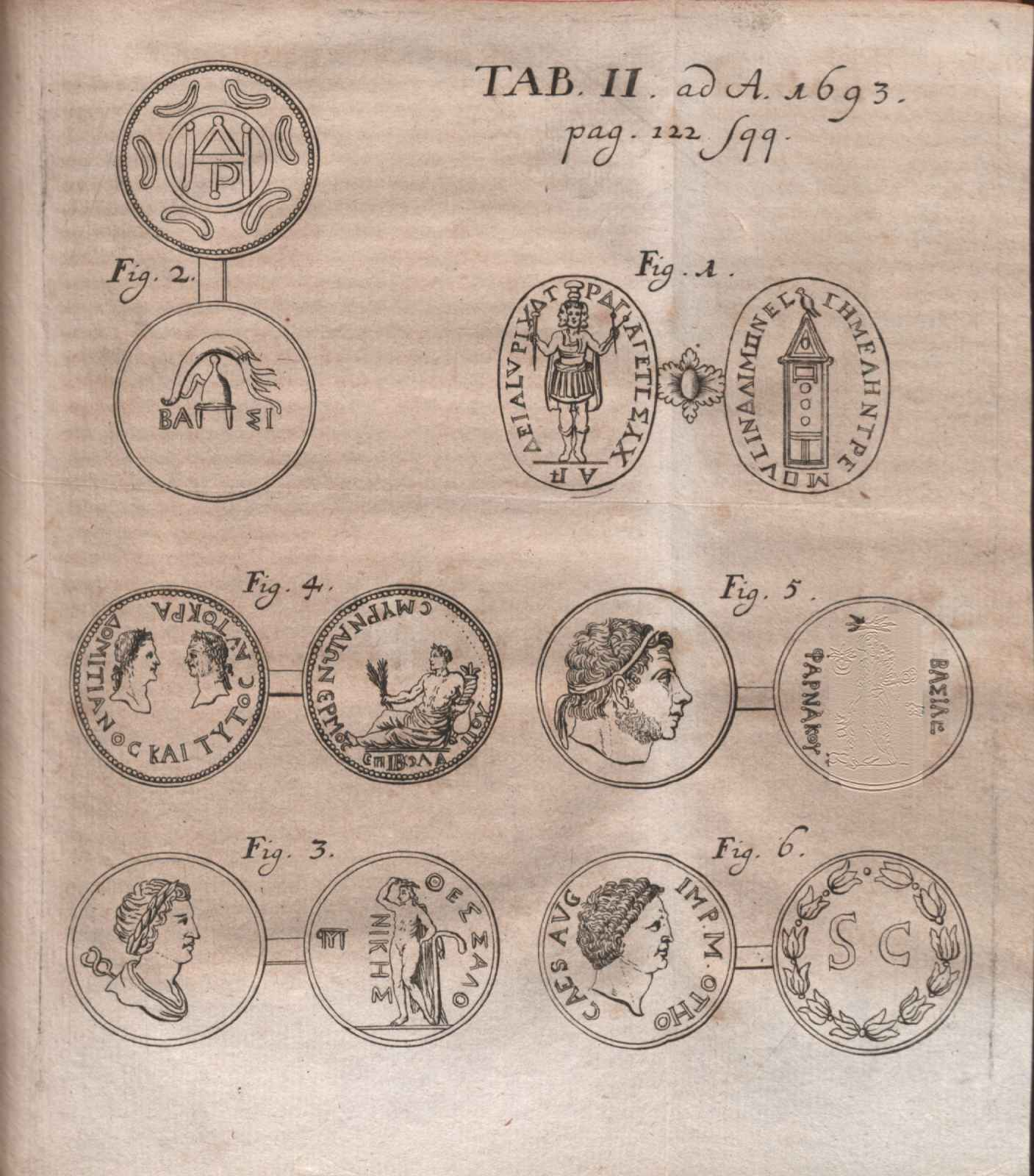 Illustration